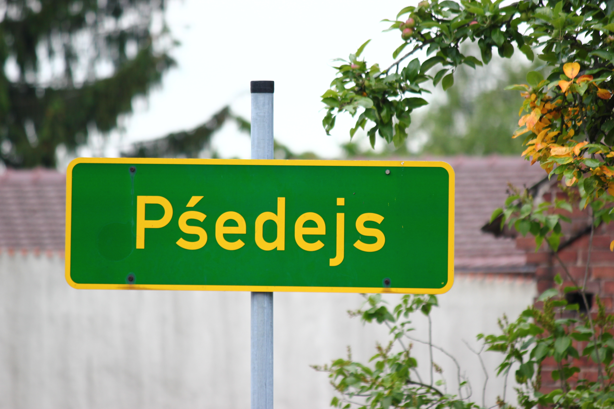 Niedersorbisches Ortshinweisschild in Dissen/Dešno, Landkreis Spree-Neiße, Brandenburg. Hornjoserbsce: Delnjoserbski napis na tafli w Dešnje, wokrjes Sprjewja-Nysa, Braniborska.